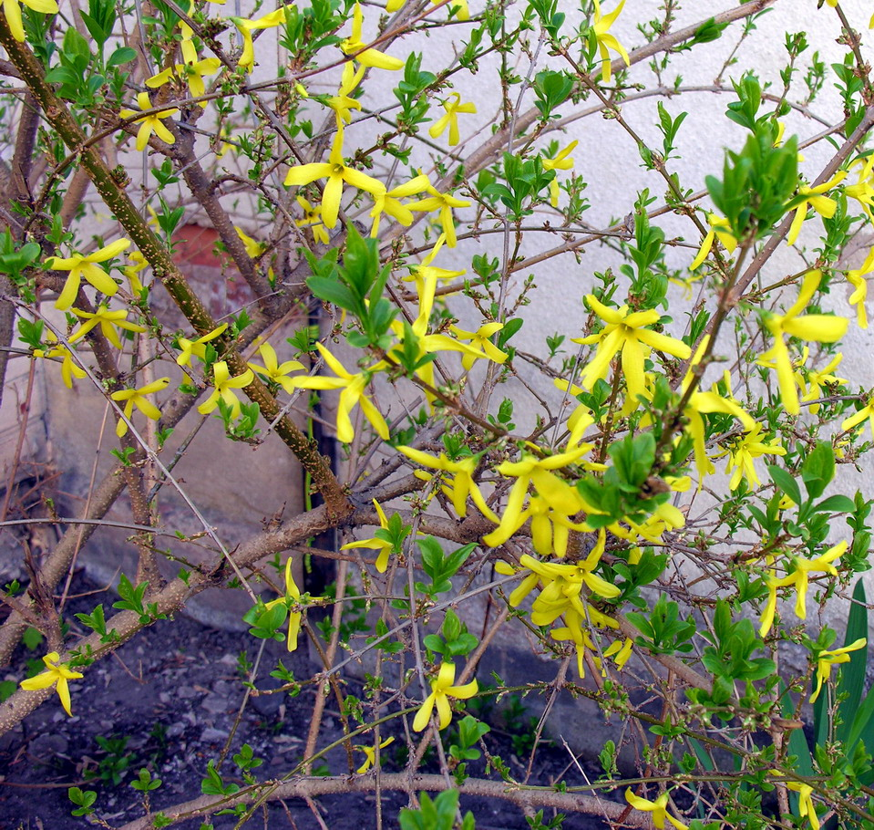 Tarpinė forsitija (Forsythia x intermedia) Šeima. Alyvmediniai (Oleaceae) Foto: Algirdas, 2006 m. gegužės 11 d.